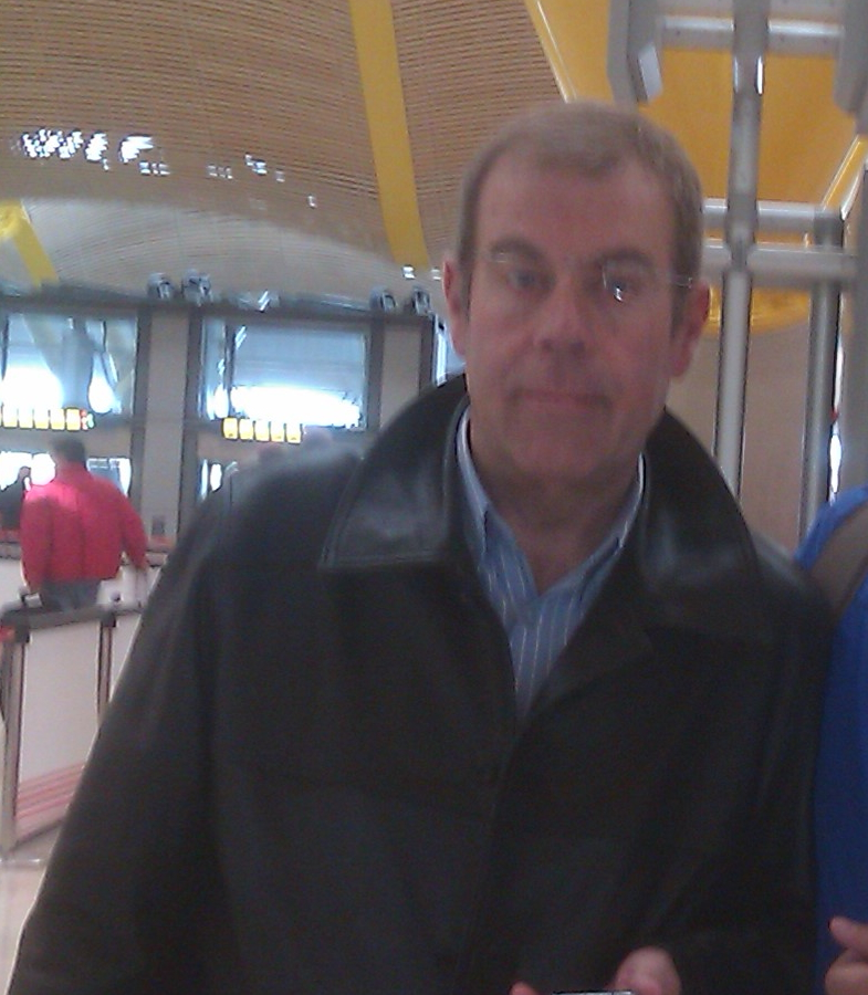 Tomás Guasch en mayo de 2012.